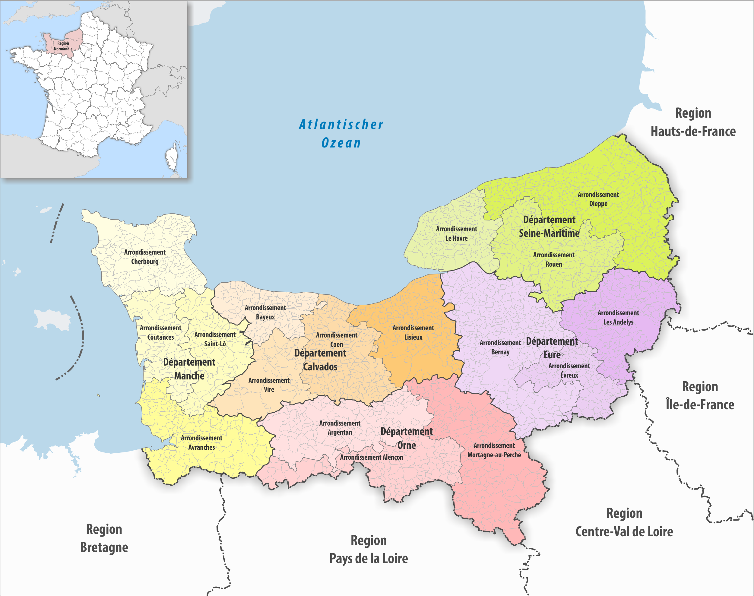 Gemeinden, Arrondissemente und Departemente in der Region Normandie